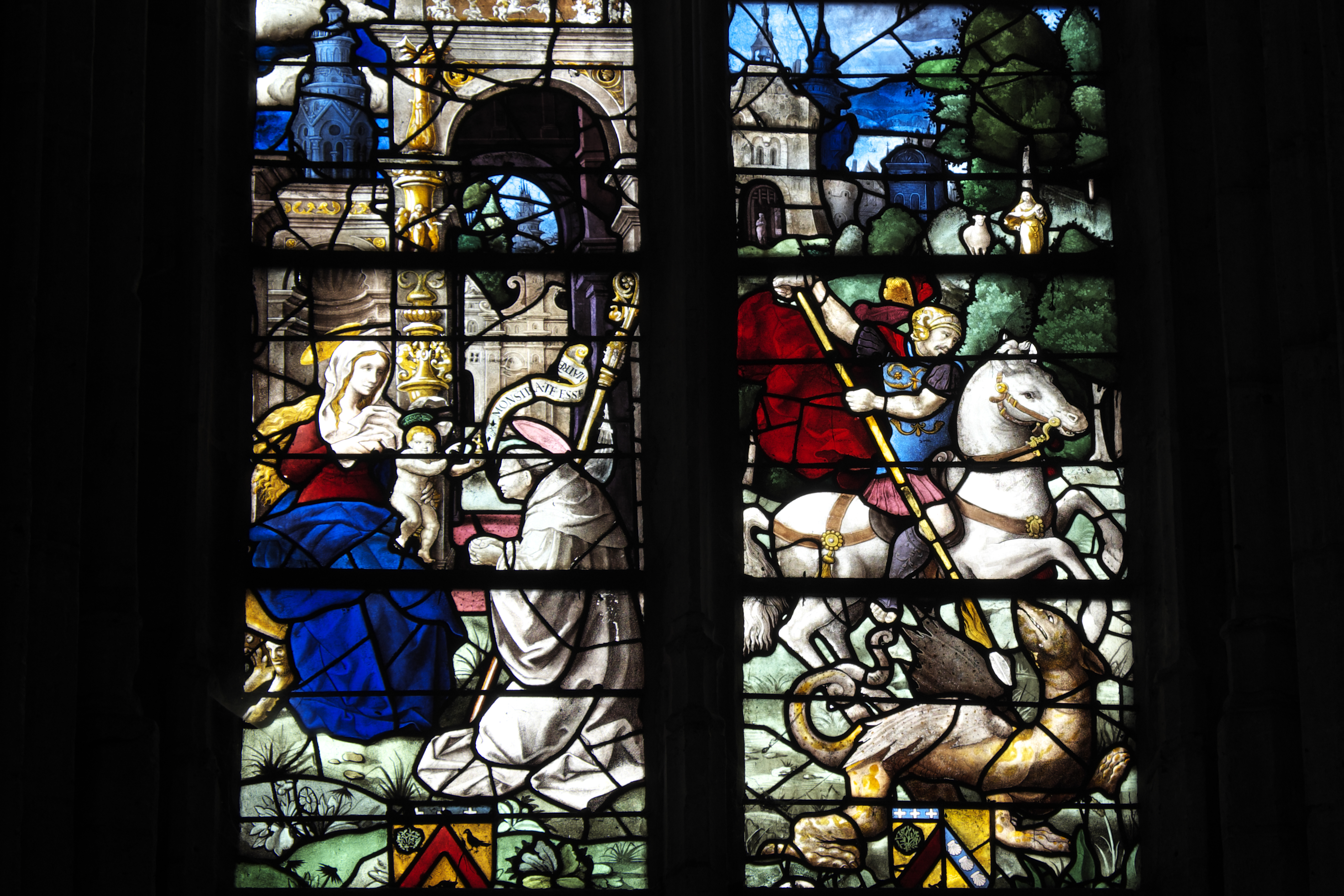 Katholische Kirche Sainte-Foy in Conches-en-Ouche im Département Eure (Haute-Normandie/Frankreich), Bleiglasfenster aus der 1. Hälfte des 16. Jahrhunderts im Chor; Darstellung: Martyrium der hl. Fides von Agen, unterer Ausschnitt: Madonna mit Kind (links), hl. Georg (rechts)